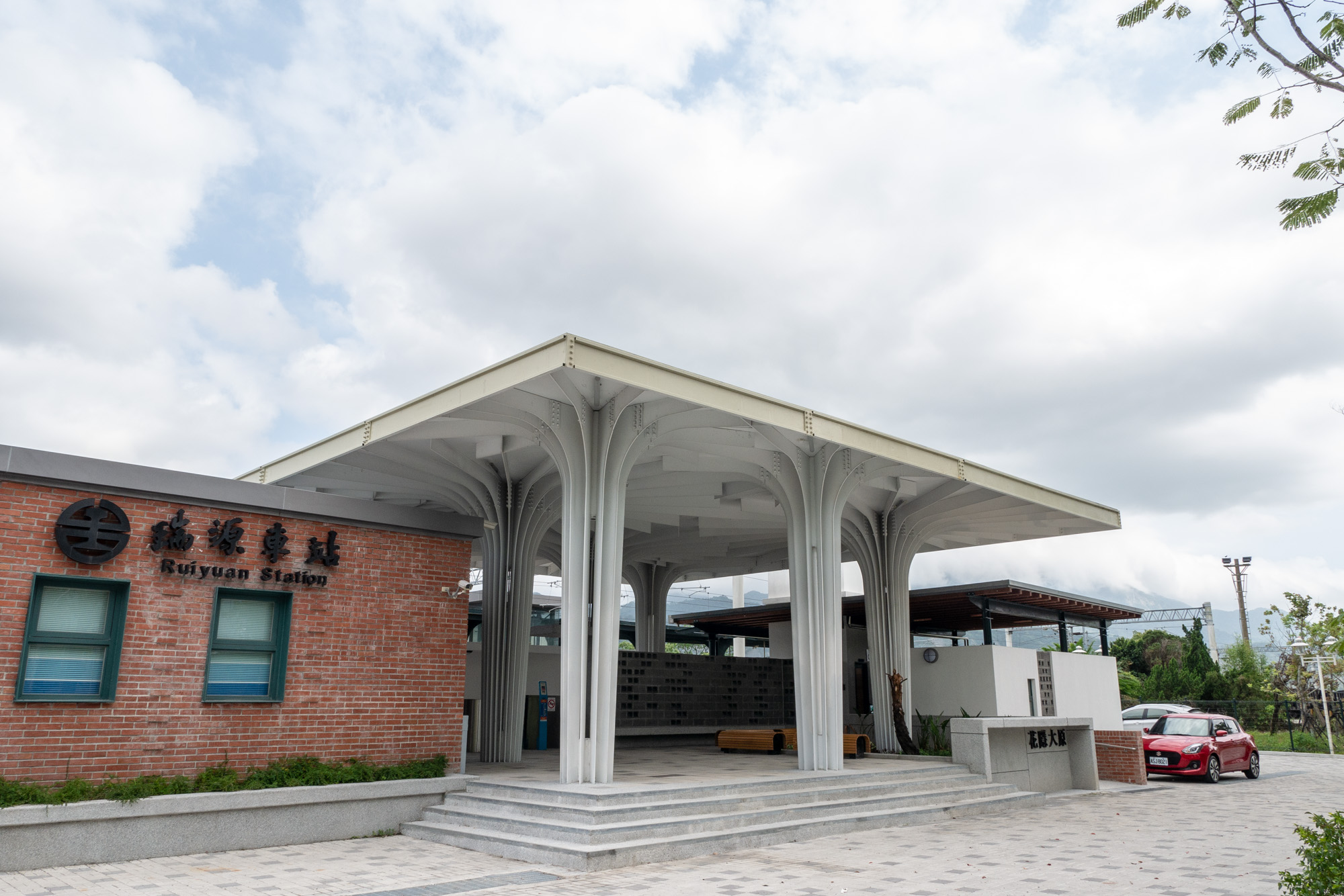 瑞源車站